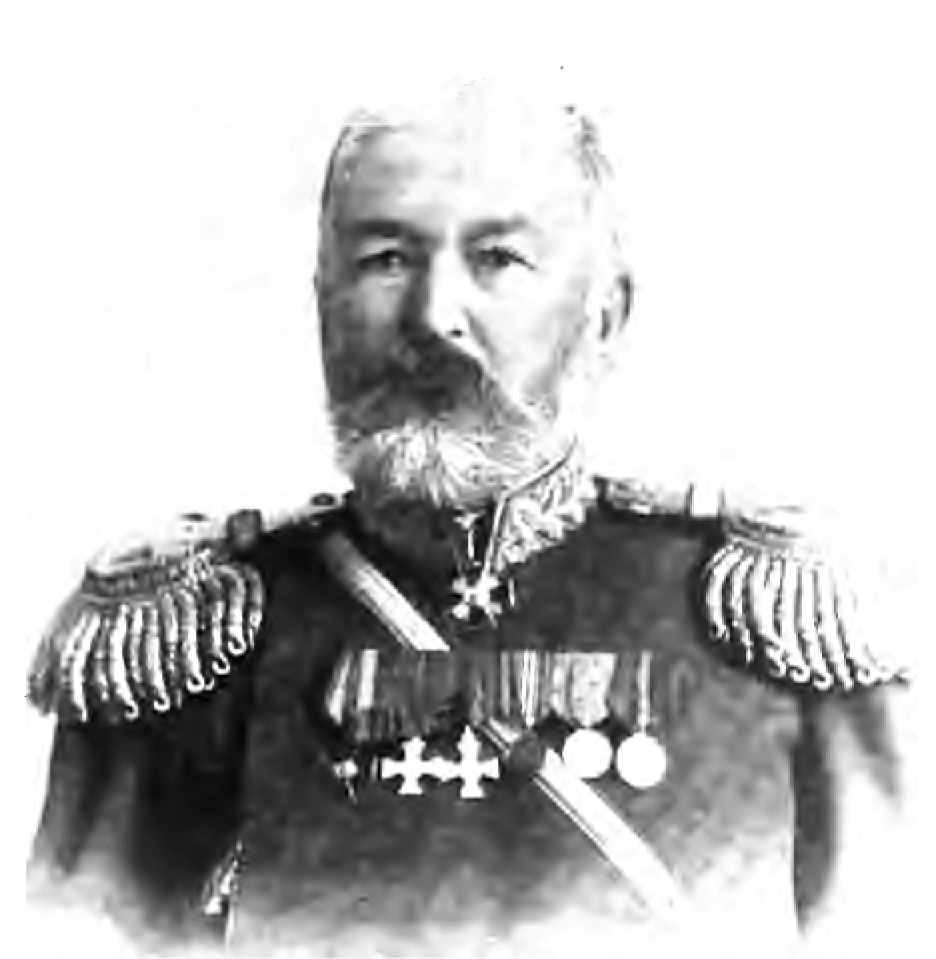 Джурабек (1841-1906), бек Китаба, один из основных противников русской армии во время Туркестанских походов, впоследствии генерал-майор русской армии.